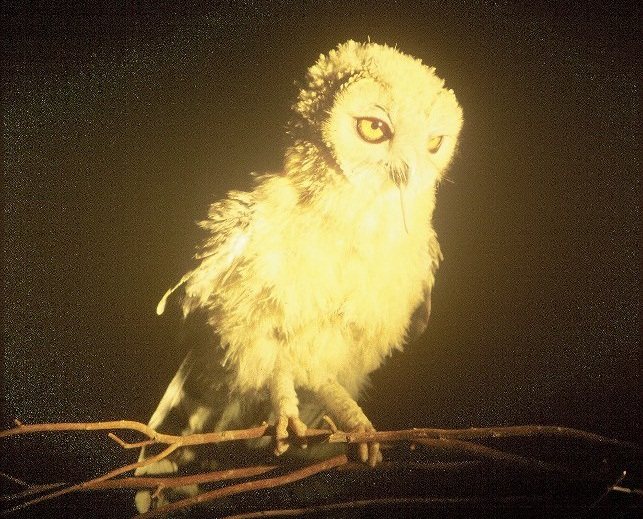 بُومة هيوم في منطقة عين جدي، من تصوير يوسي إيهود.